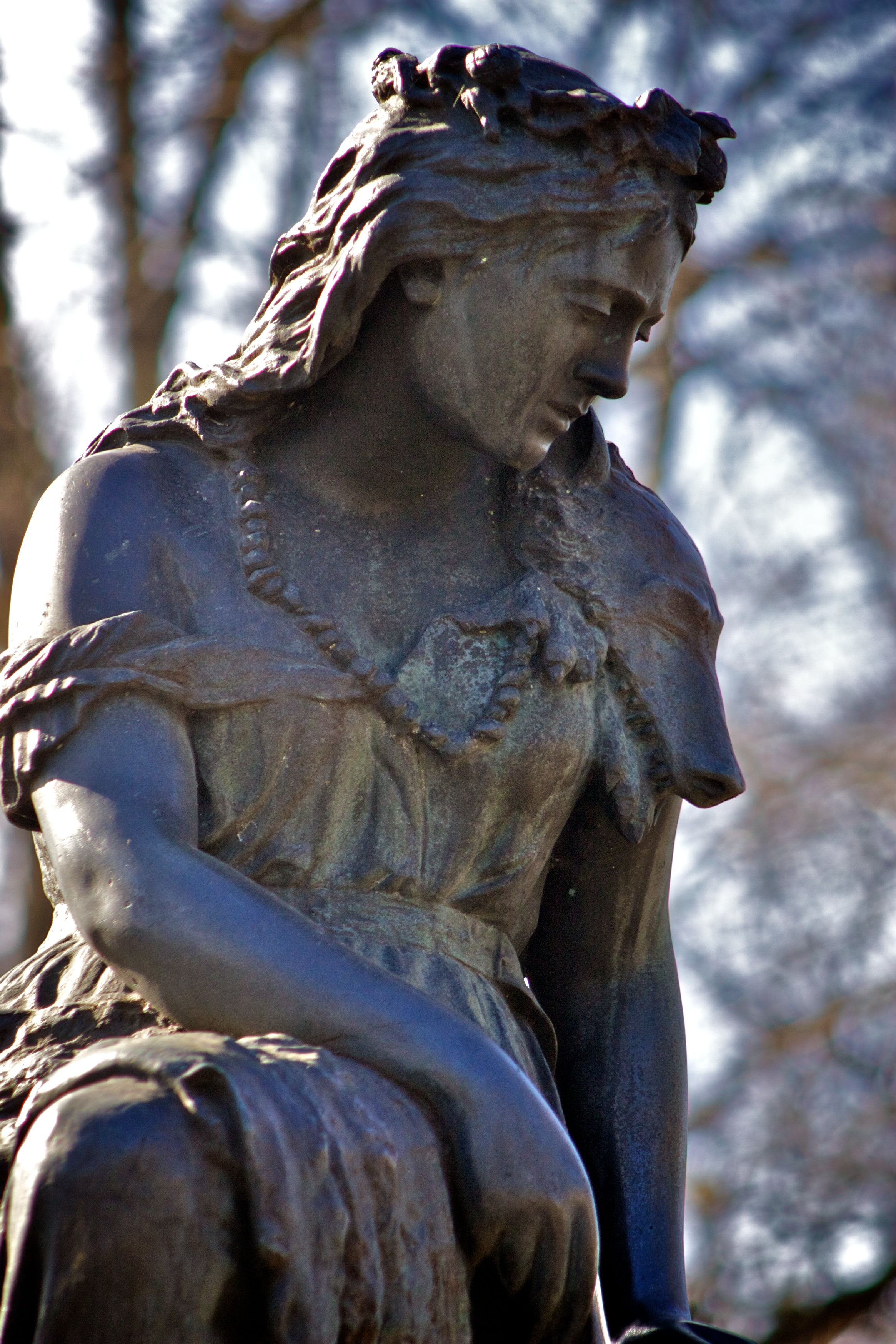 Linda, August Weizenberg, 1820